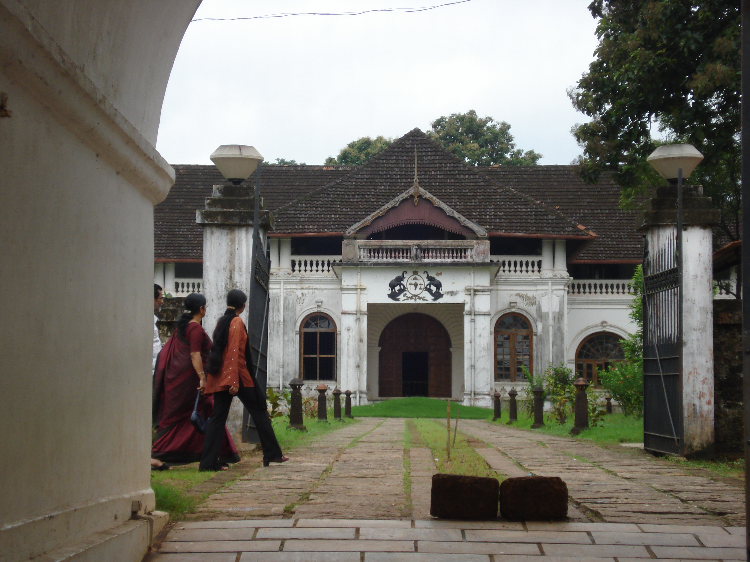 Shakthan Thampuran Palace. Now it is a museum.